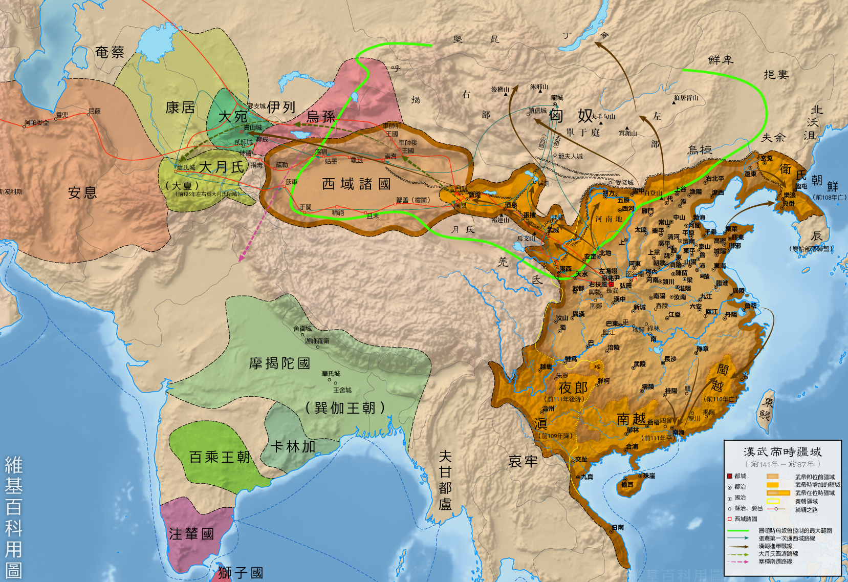 汉武